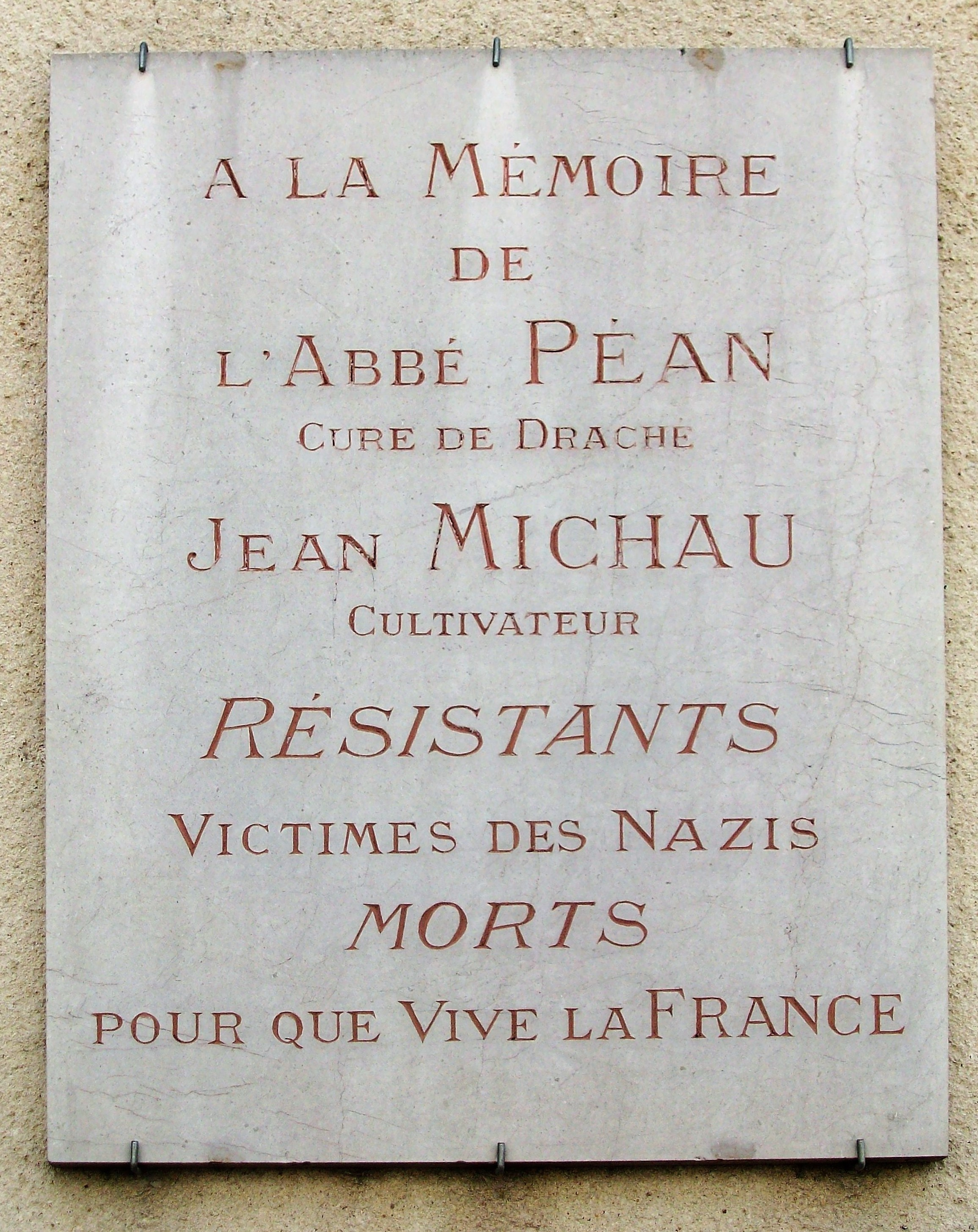 Plaque à la mémoire de l'abbé Péan et de Jean Michau résistants à Draché (France), apposée sur la façade de la mairie